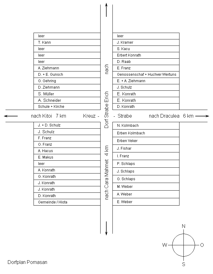 Помазани 1930